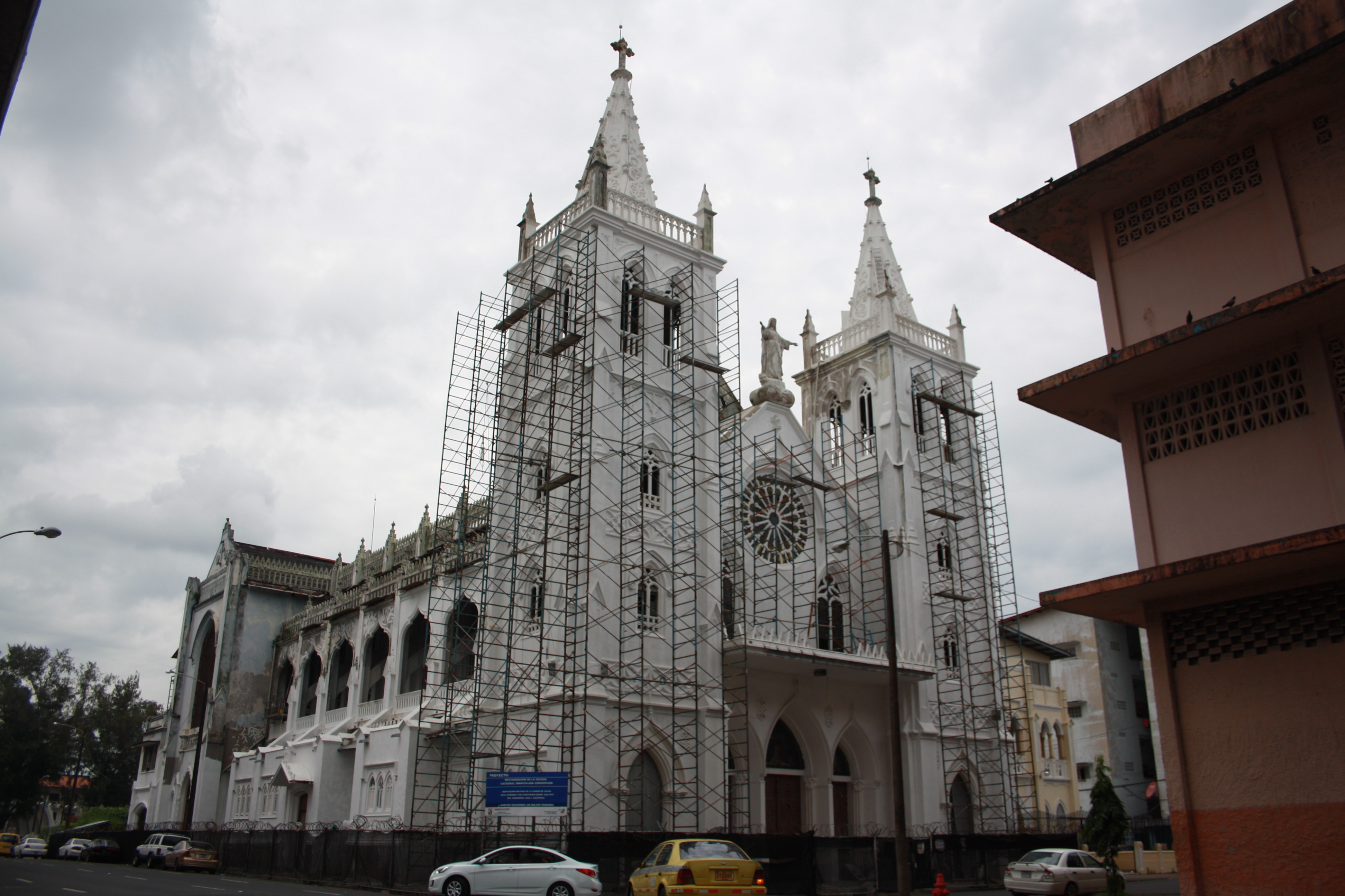 Catedral de la Inmaculada Concepción